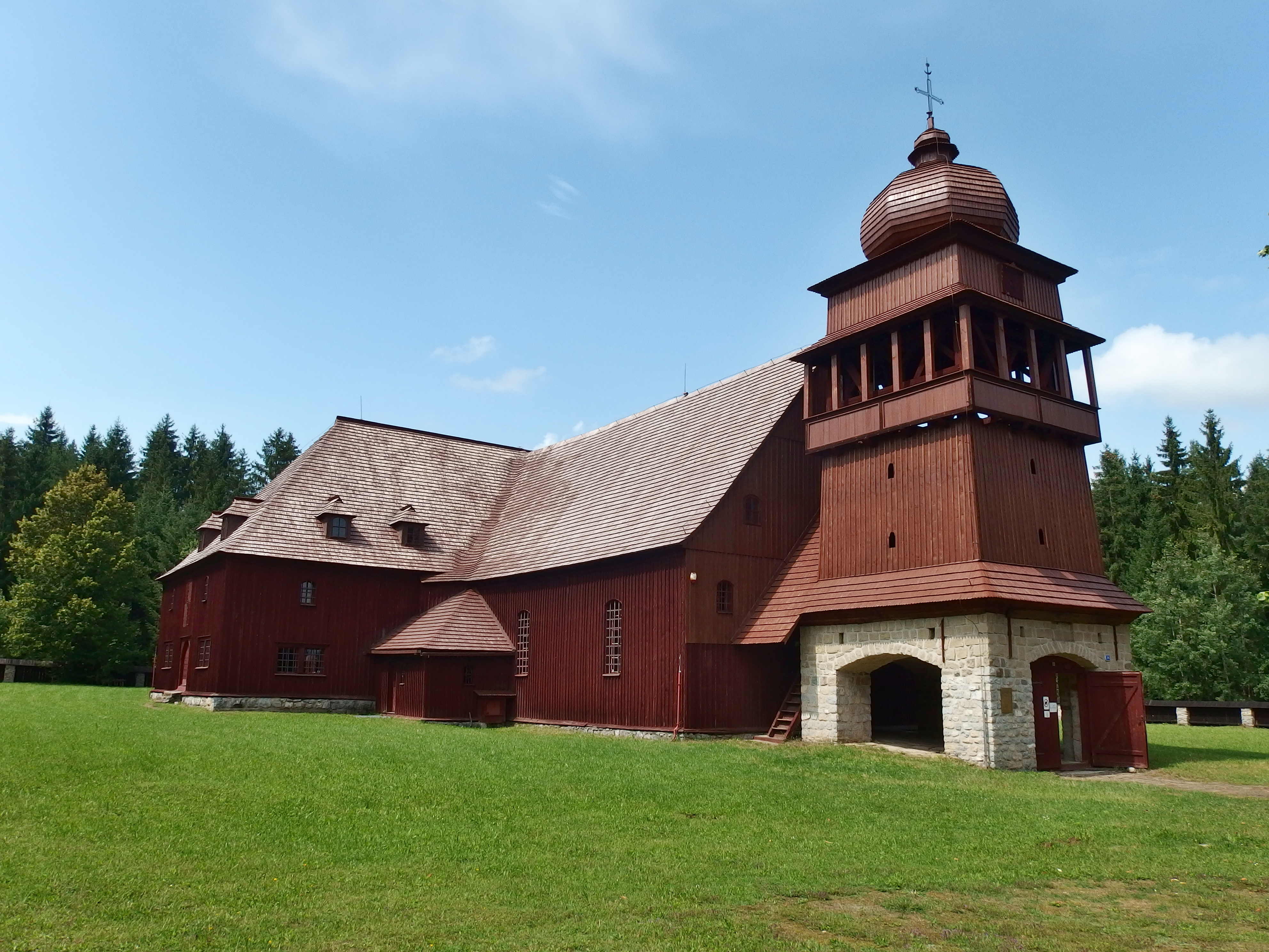 Kostol drevený